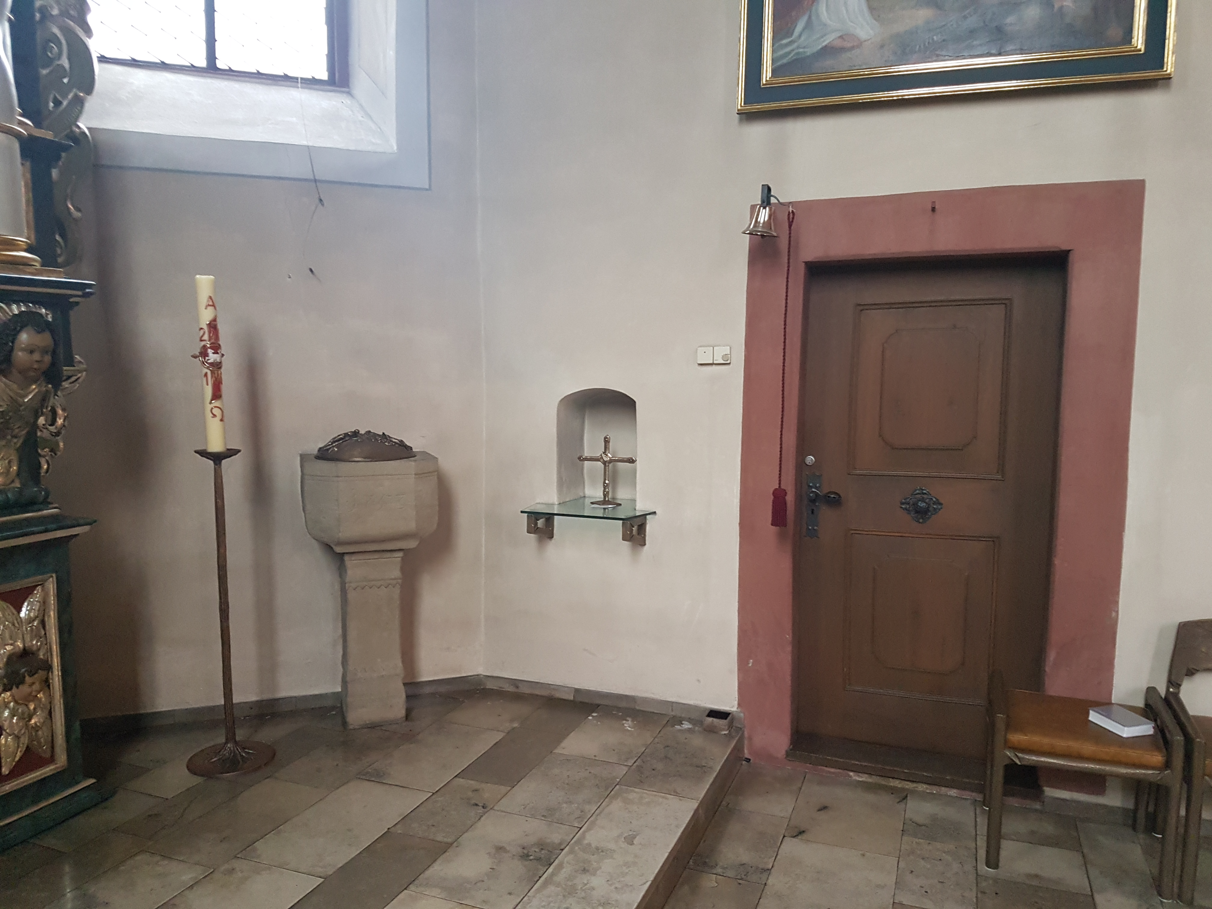 St. Georg Oberbalbach Innenansicht